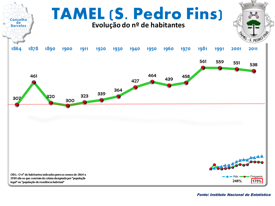 Censos 1864/2011